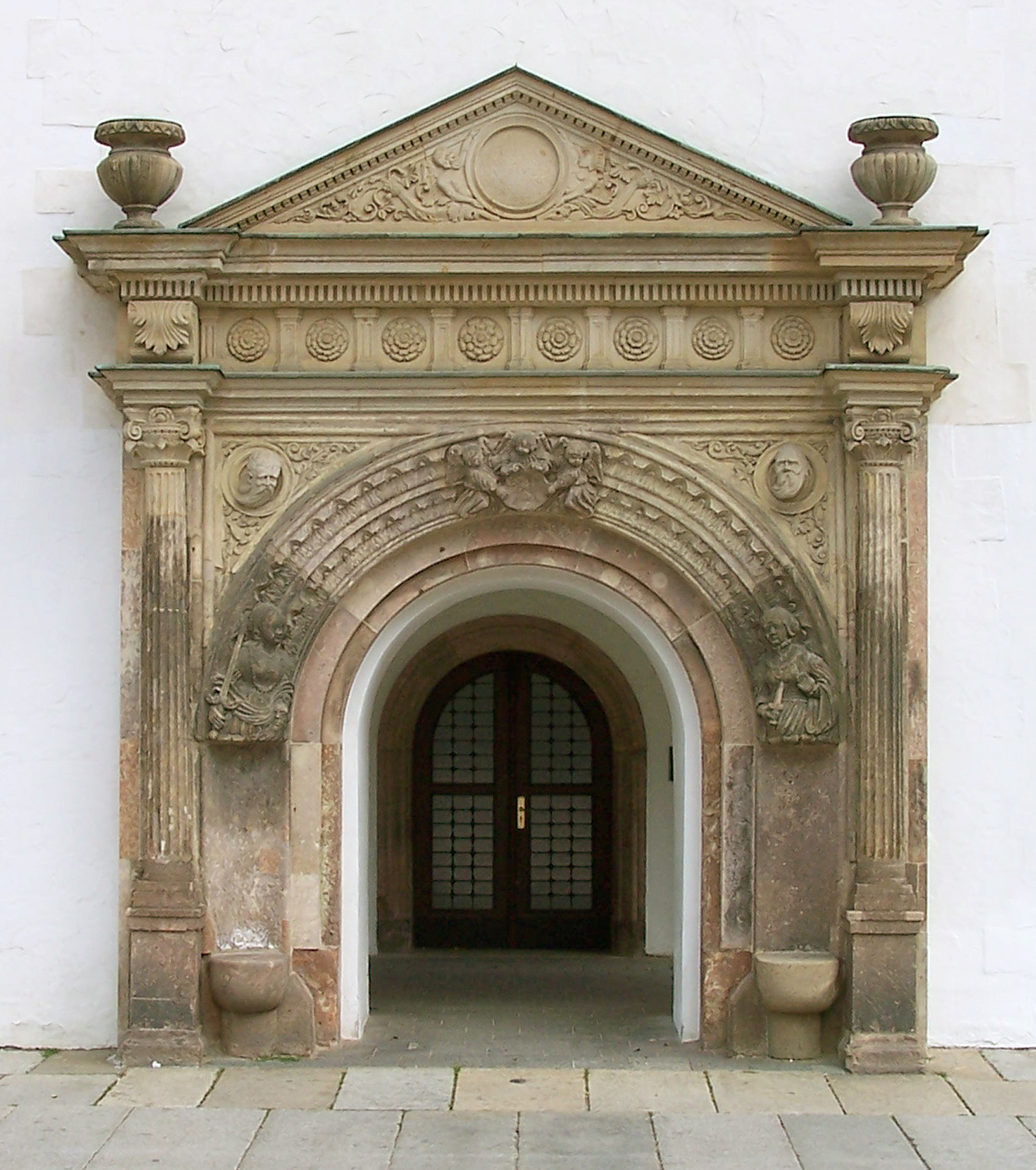 Das Judith-Lukretia-Portal aus dem Jahr 1559 am Alten Rathaus in Chemnitz